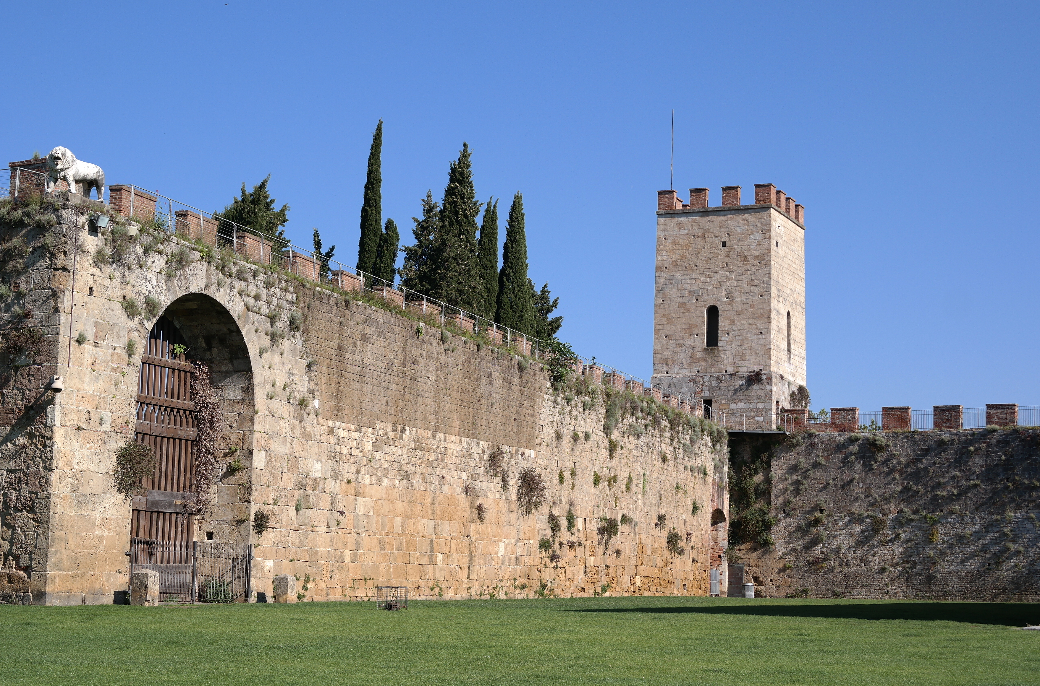 Mura di Pisa viste dalla Piazza dei Miracoli